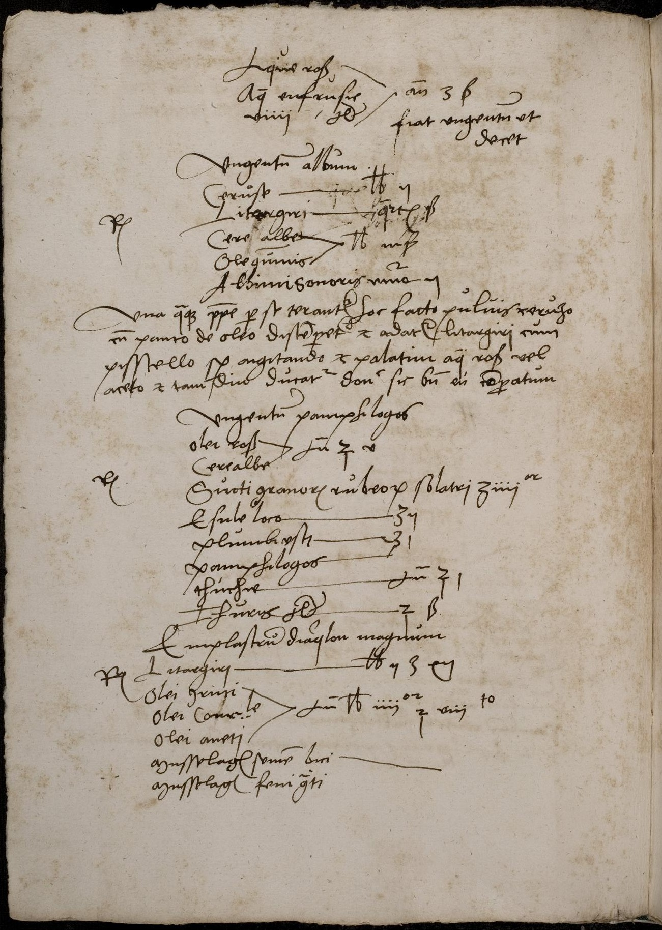 Codex Palatinus germanicus 1, "Astrologisch-medizinische Sammelhandschrift", Blatt 42v der Handschrift: Rezepte für Pflaster